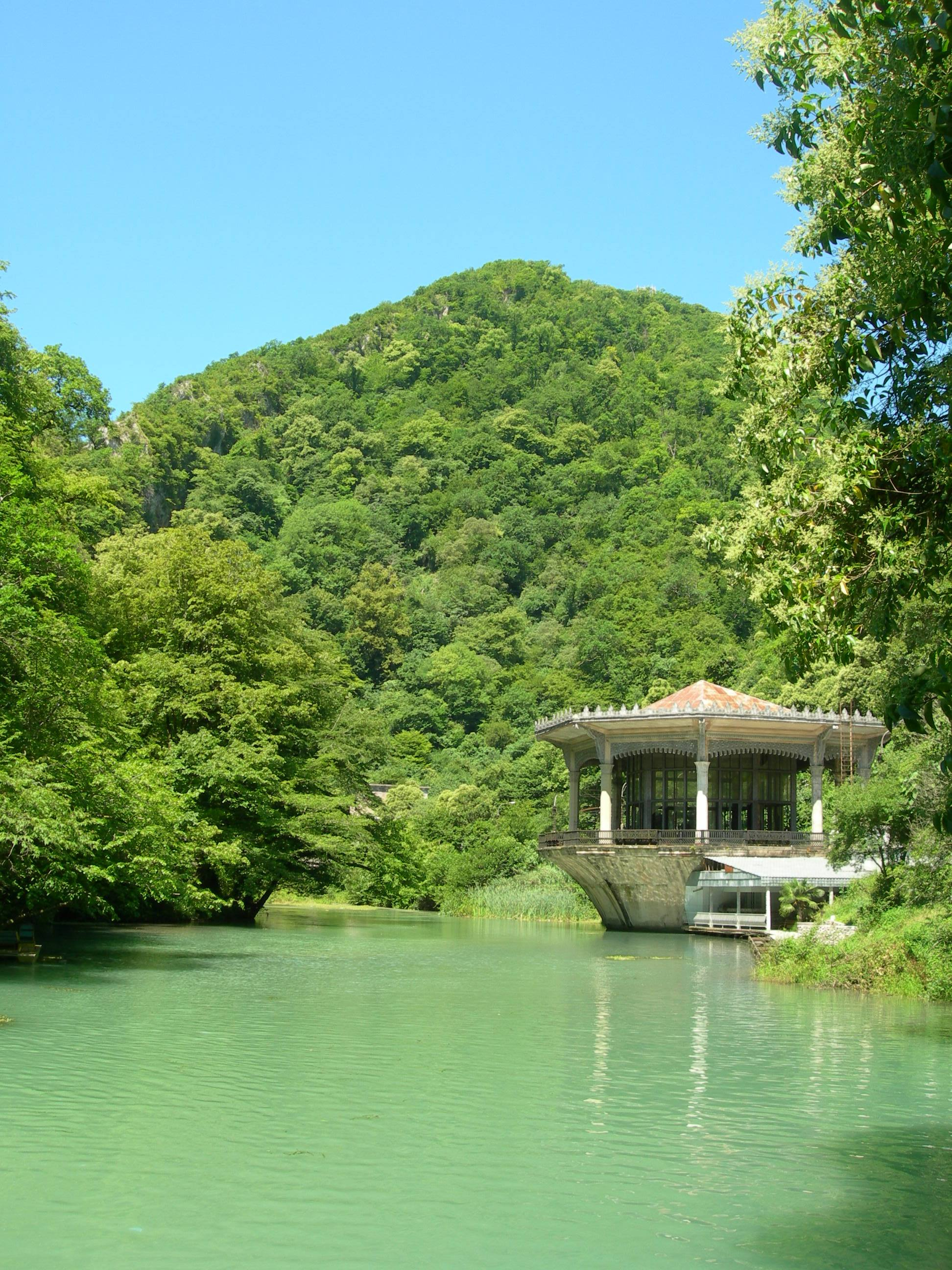 Psyrtskha station